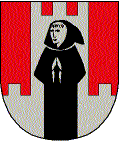 Wappen der Gemeinde Reith bei Kitzbühel in Österreich